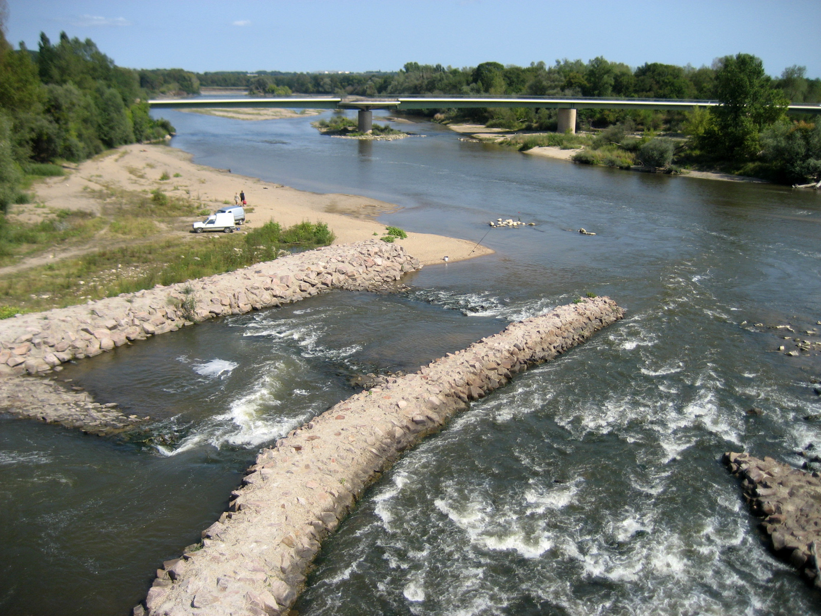 Allier river at Le Bec d'Allier, seen from the Pont-canal du Guétin (Canal latéral à la Loire). Département du Cher, France.